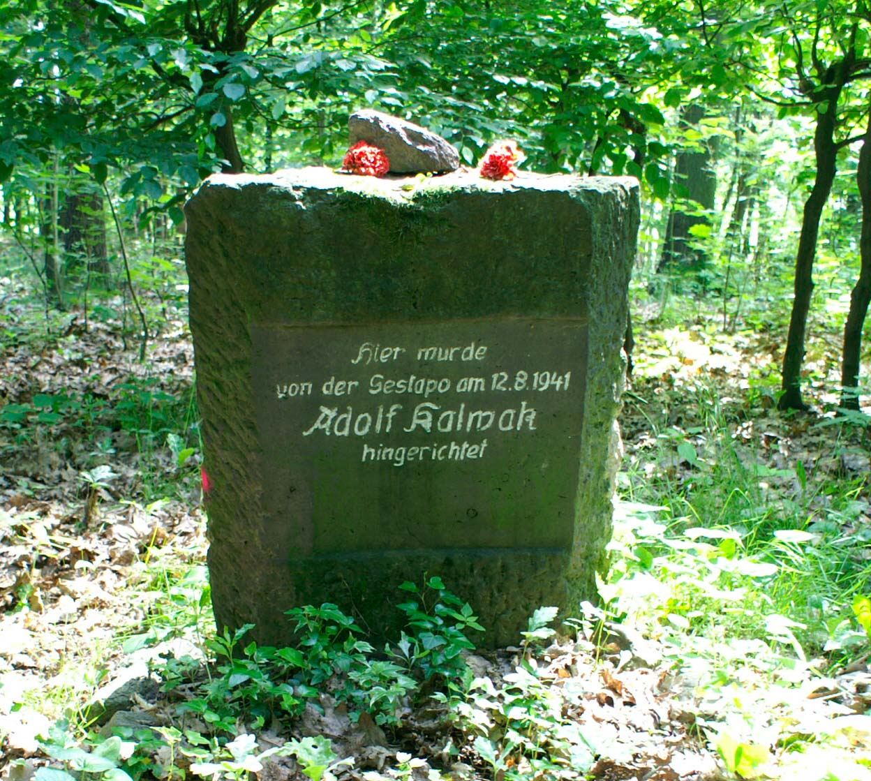 Gedenkstein am Marktstein im Poisenwald, Possendorf. Adolf Kalwac war ein polnischer Zwangsarbeiter.